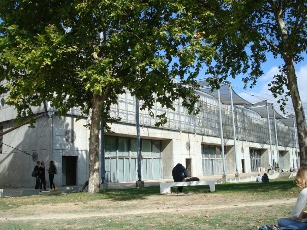 ENSA Lyon coté Amphithéâtre de verdure